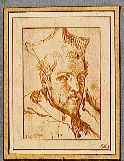 El cardenal Odoardo Farnese